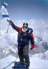 ב 1992 העפיל דורון אראל לפסגת האוורסט והפך לישראלי הראשון שניסה והצליח להעפיל לפסגה זו